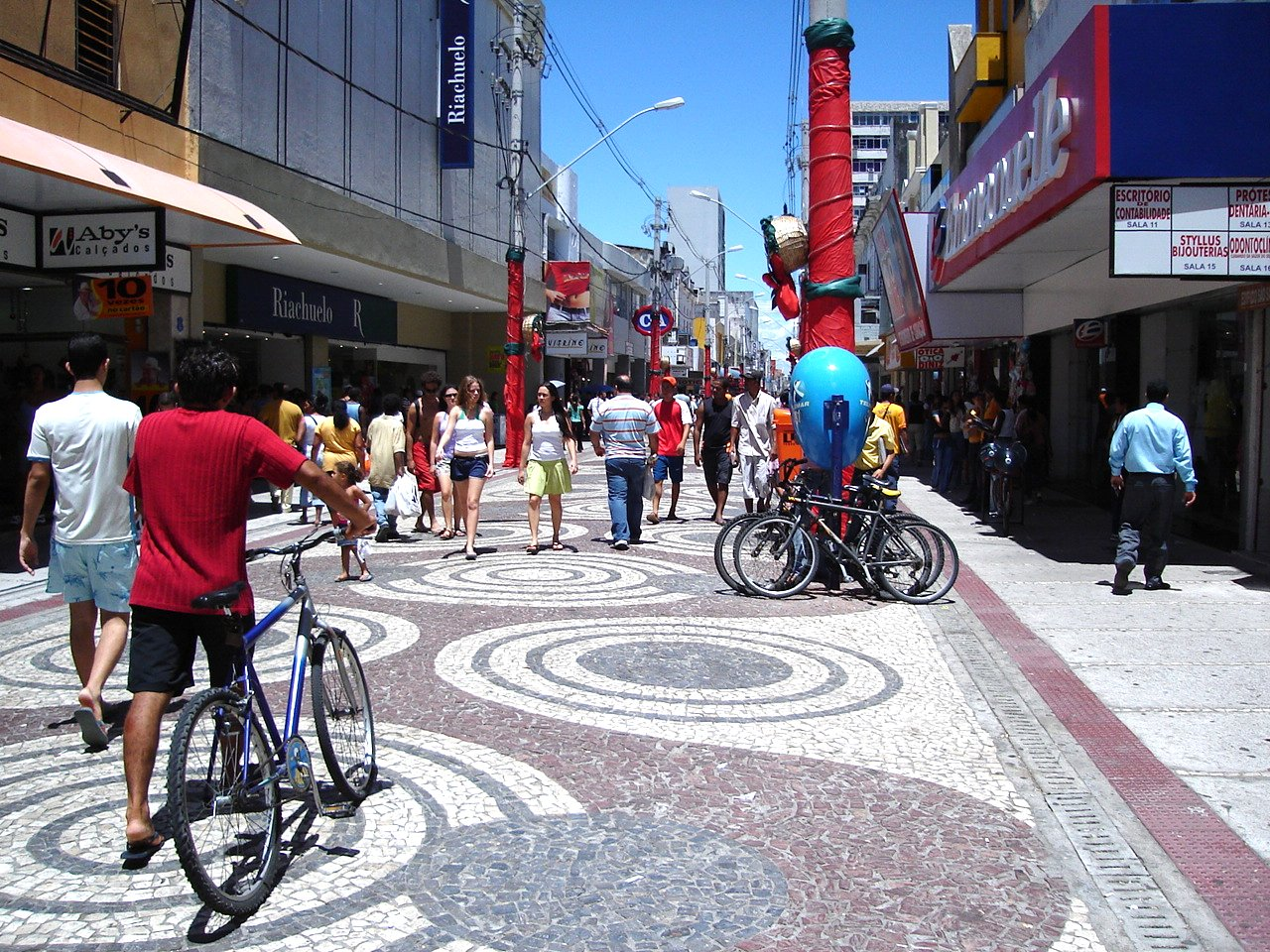 Centro da cidade de Aracaju, Brasil Aracaju-Brazil downtown.